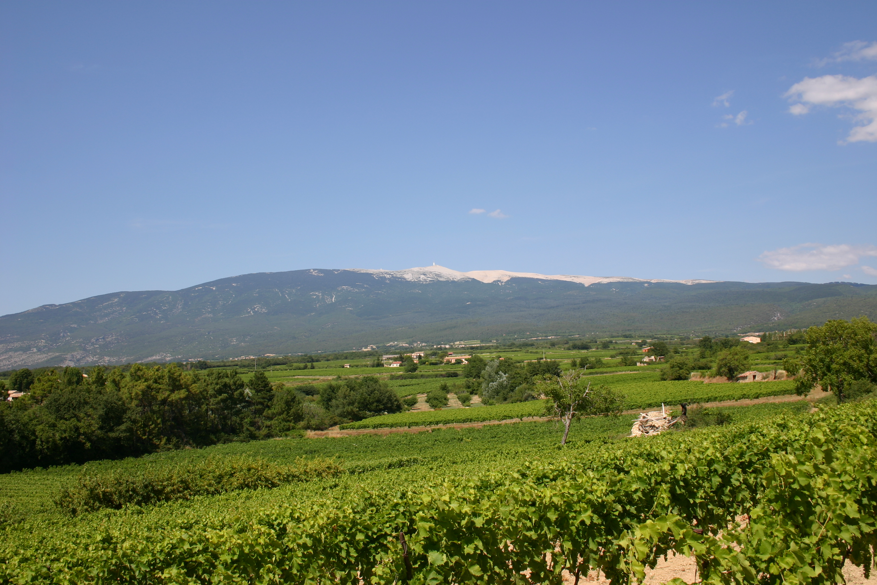 Le mont Ventoux (vu depuis le sud) par dessus les vignes de la plaine entre Carpentras et Flassan, France